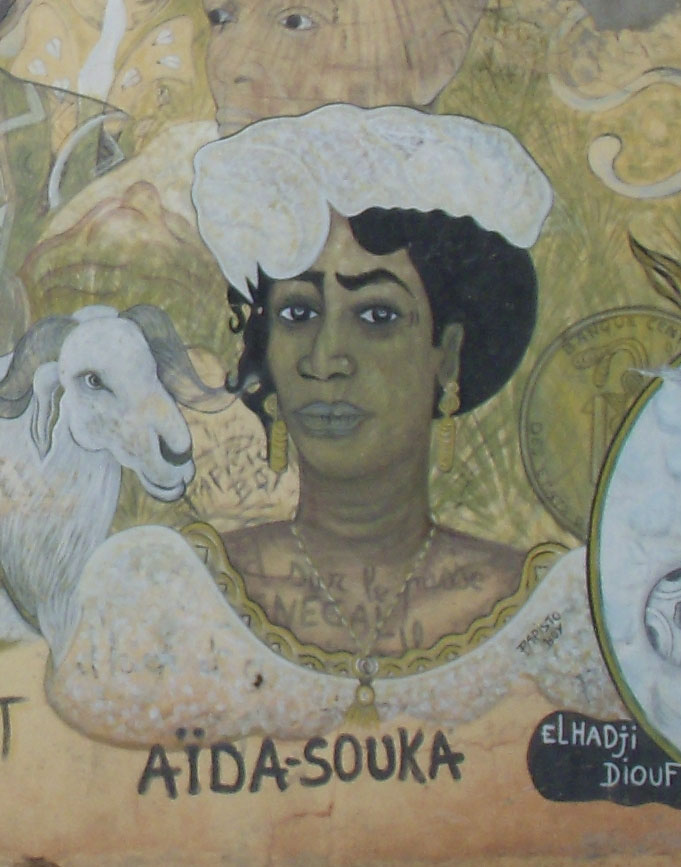 Héroine du film de Mansour Sora Wade, Aïda Souka (fresque à Dakar, Sénégal)